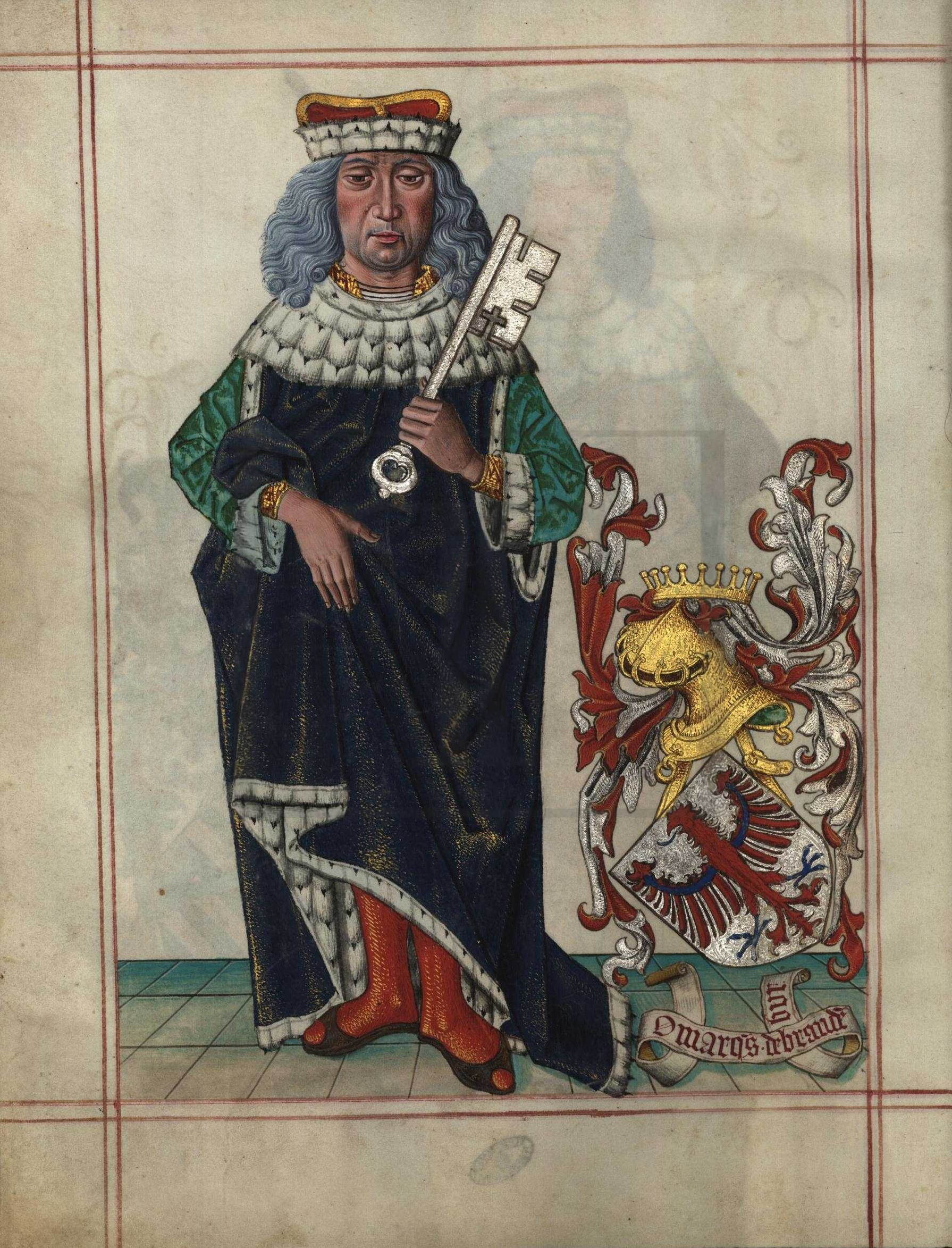 Livro do Armeiro-Mor, Margrave de Brandenburgo (fl 34v)